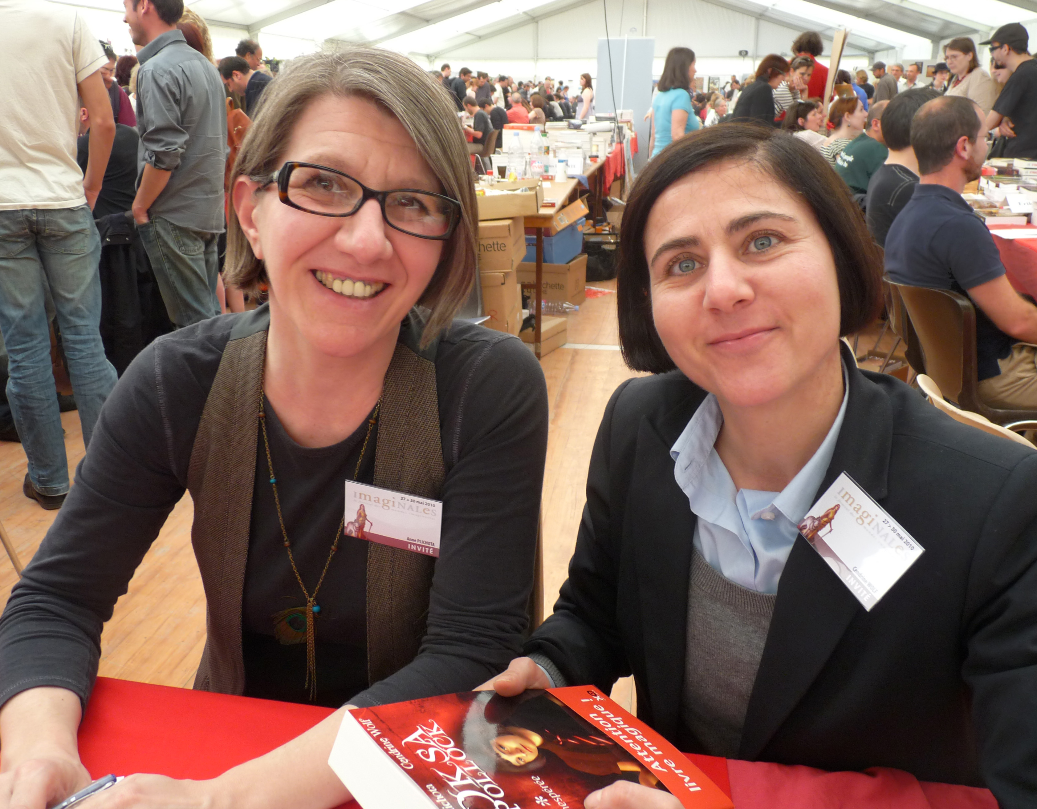 Anne Plichota et Cendrine Wolf (Imaginales 2010, Epinal).